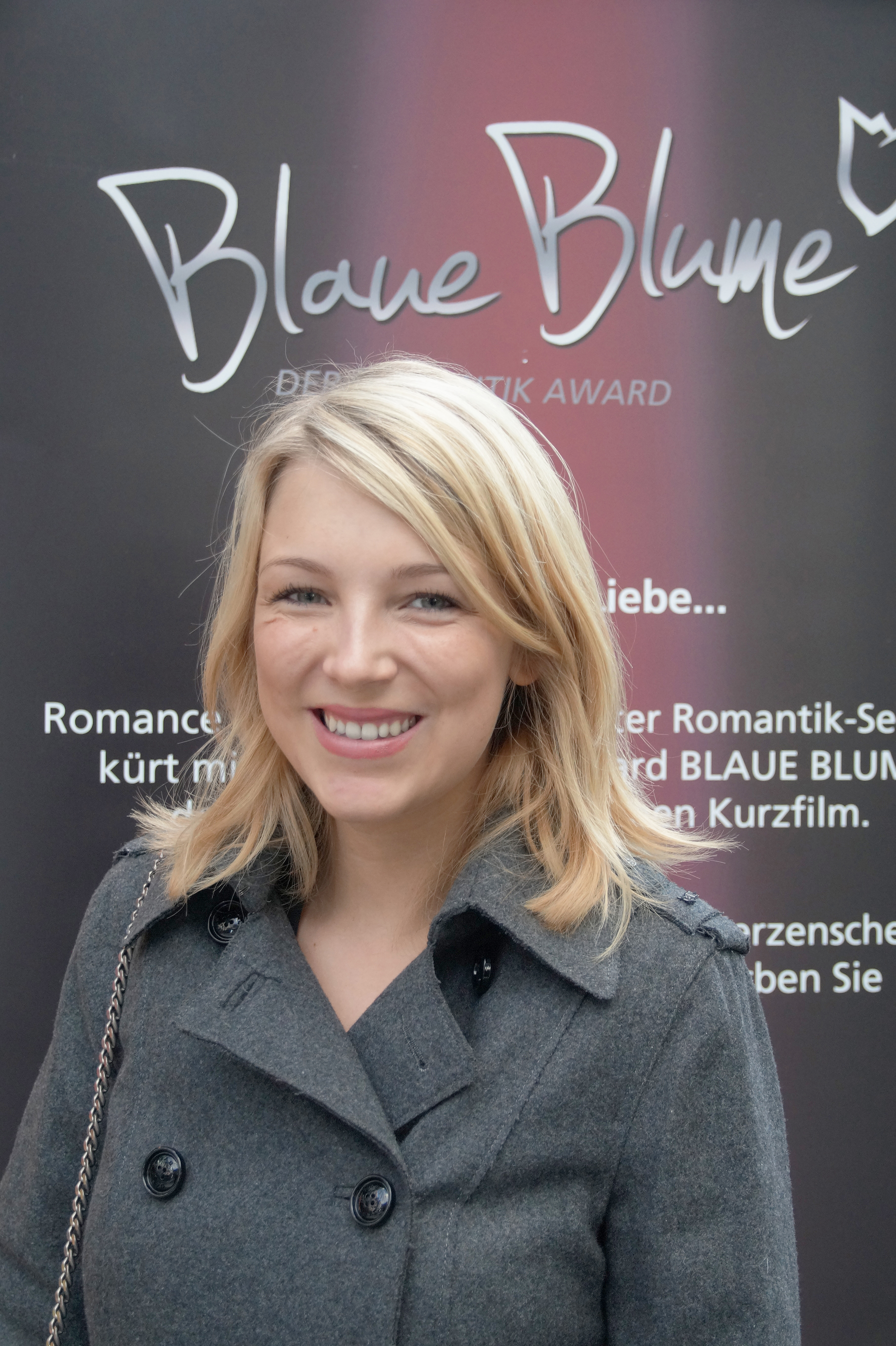 Iris Mareike Steen bei der Verleihung des Kurzfilmpreises "Blaue Blume", am 10.02.2016, im Sony Center Berlin.